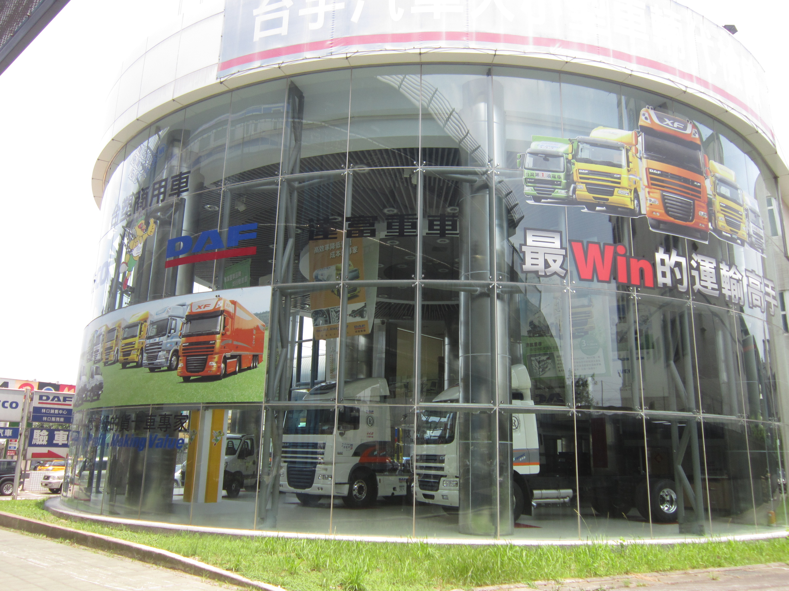 台宇汽車「台塑多功能汽車生活城」，位於桃園市龜山區文化一路41之1號（林口長庚紀念醫院正對面），設置達富重車林口銷售中心與林口服務廠。